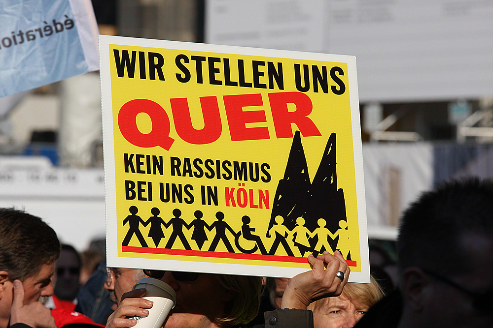 Protestveranstaltungen gegen die Kundgebung eines „Anti-Islamisierungskongresses“ der „Bürgerbewegung Pro Köln“ im September 2008